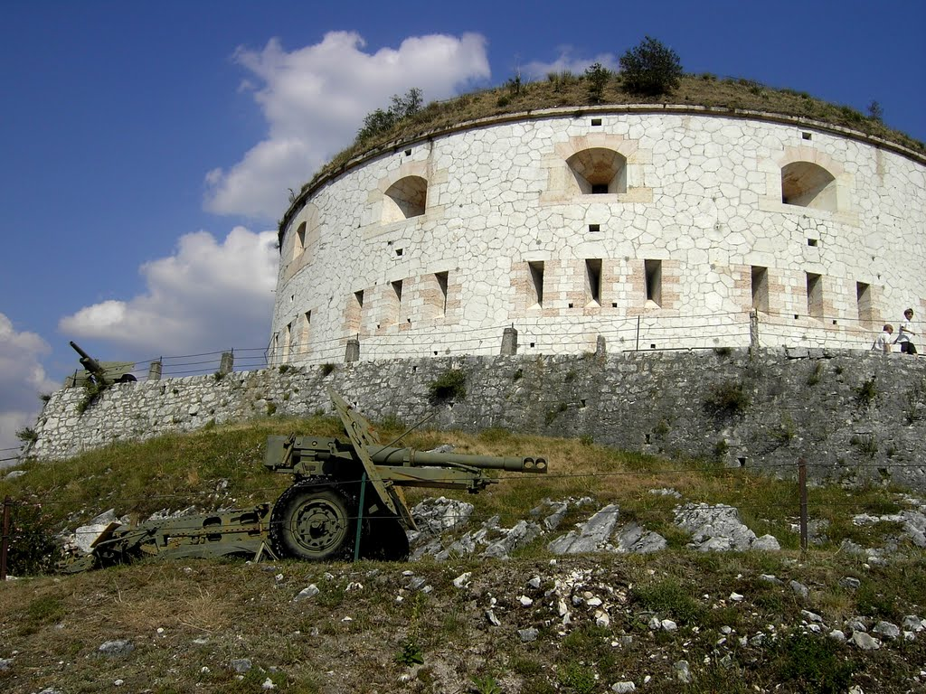 Festung Forte Rivoli